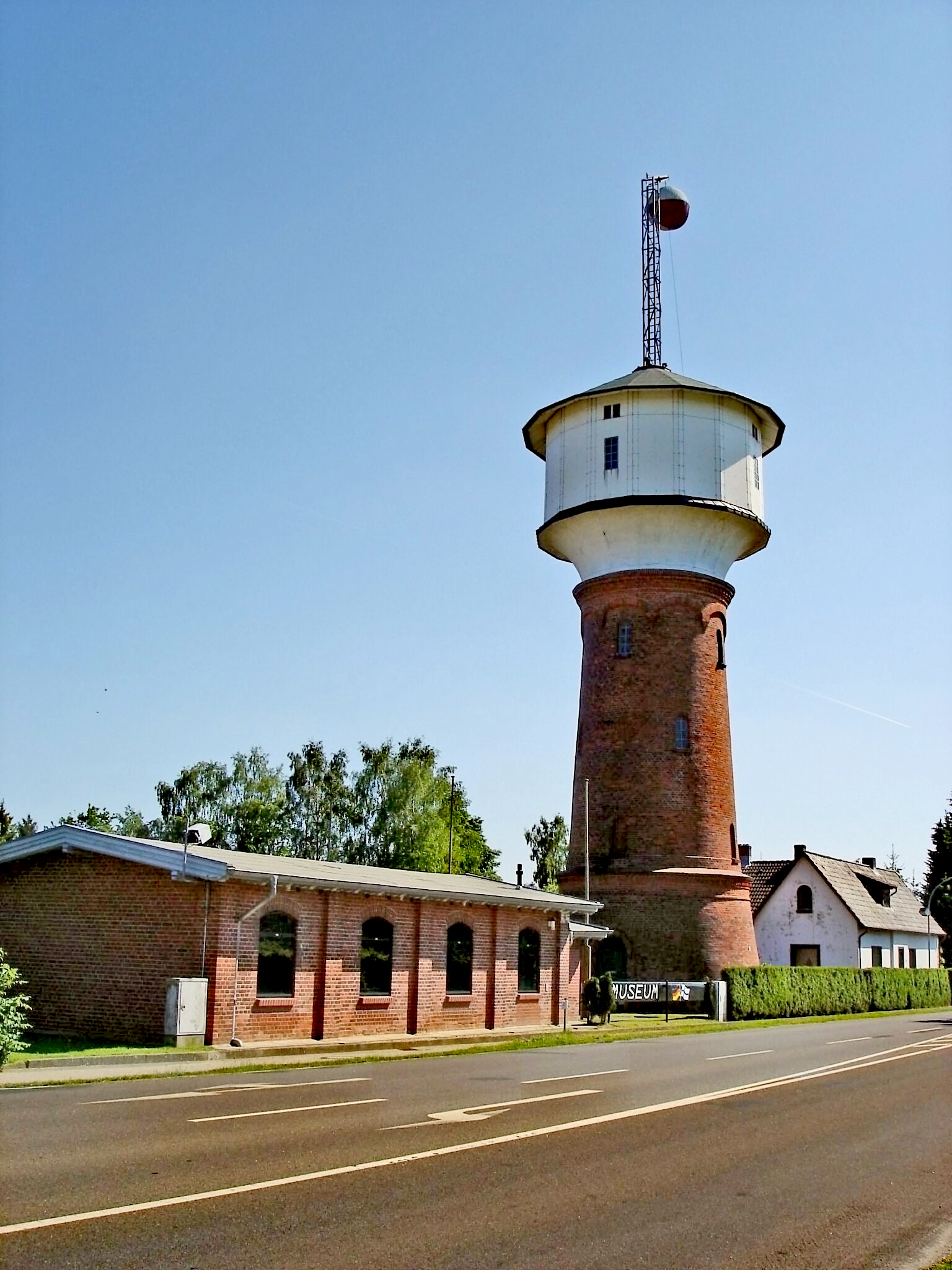 Der ehemalige Wasserturm in Hohenlockstedt mit aufgezogenem Ballon. Zur Zeit des militärischen Lockstedter Lagers war dies ein Warnsignal an die Bevölkerung. Ausserhalb des Ortes wurde scharf geschossen, es bestand Gefahr. Autor: Nightflyer Source: Eigenes Foto